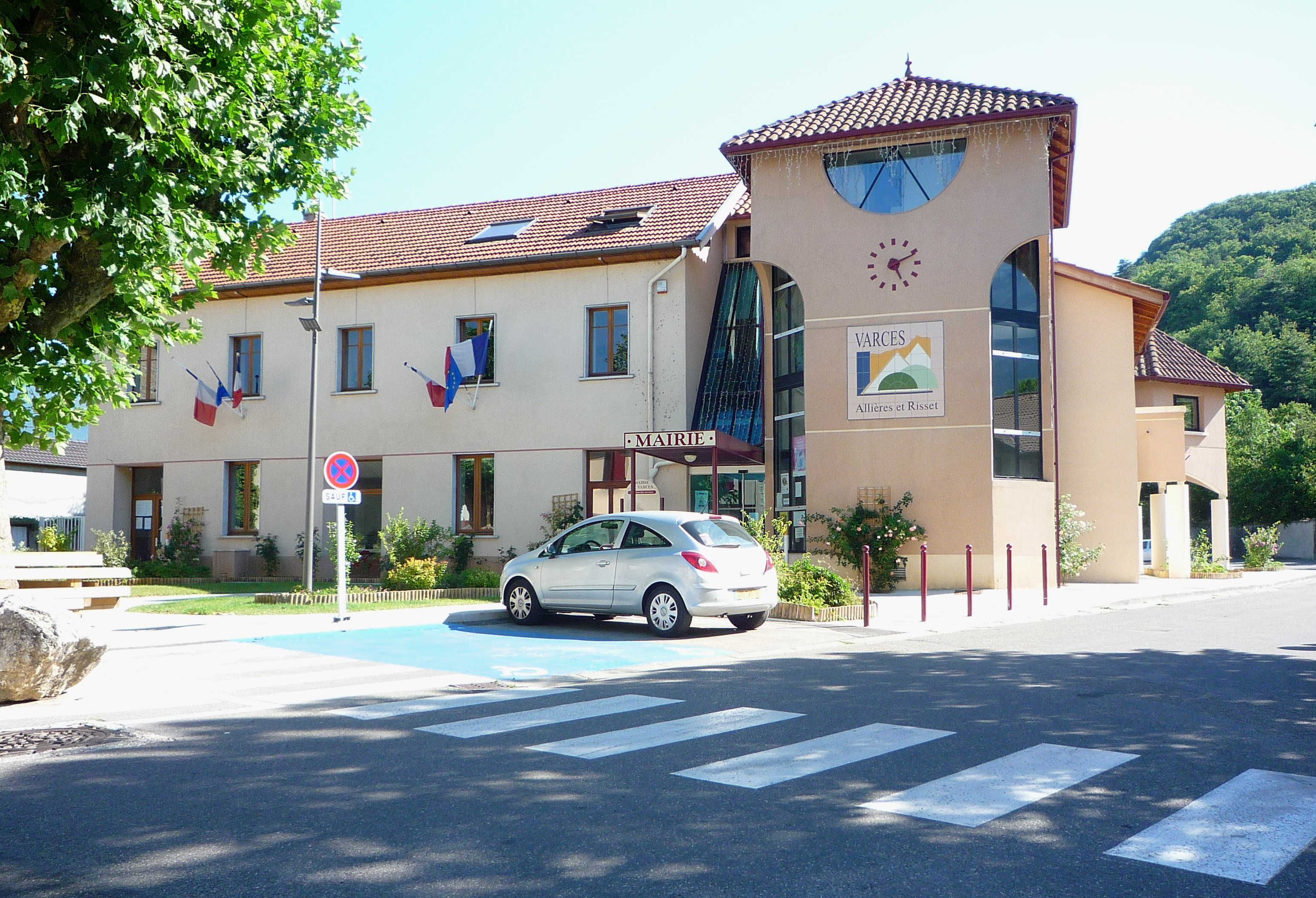 Mairie de Varces-Allières et Risset (Isère)